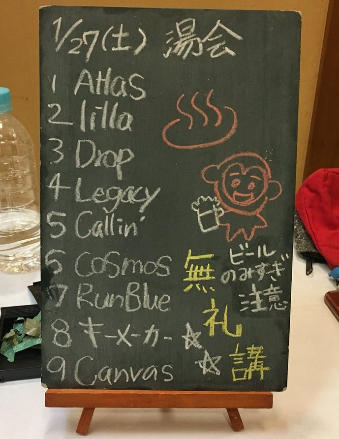 amiinAセトリボード(20180127(1))